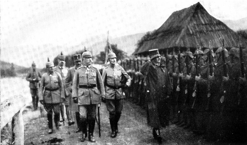 Erzherzog Karl, der spätere Kaiser Karl von Österreich, begrüßt die eingetroffenen deutschen Jäger in den Karpathen